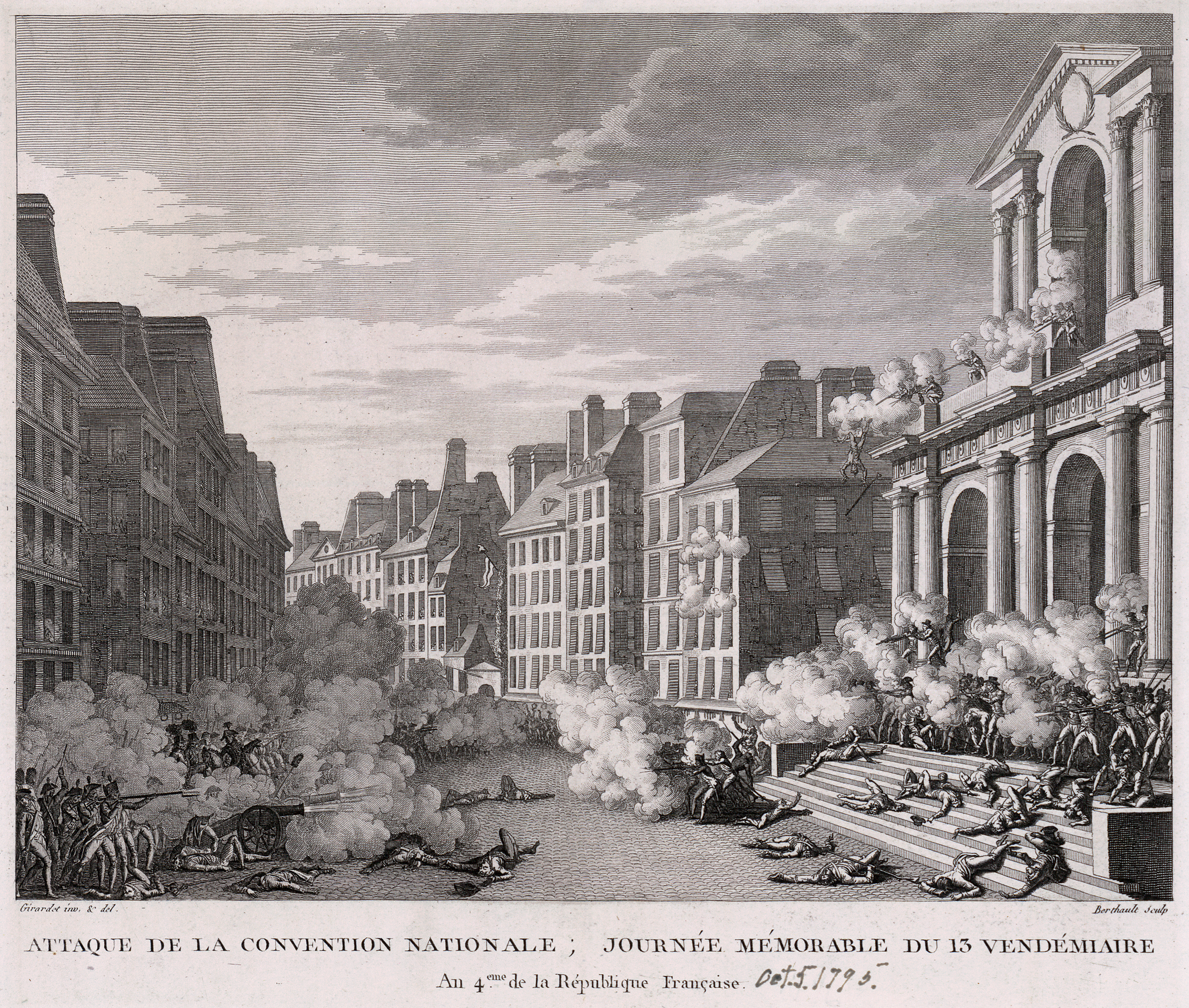 Attaque de la Convention nationale. Insurrection royaliste du 13 vendémiaire an IV (5 octobre 1795), fusillade devant l'église Saint-Roch